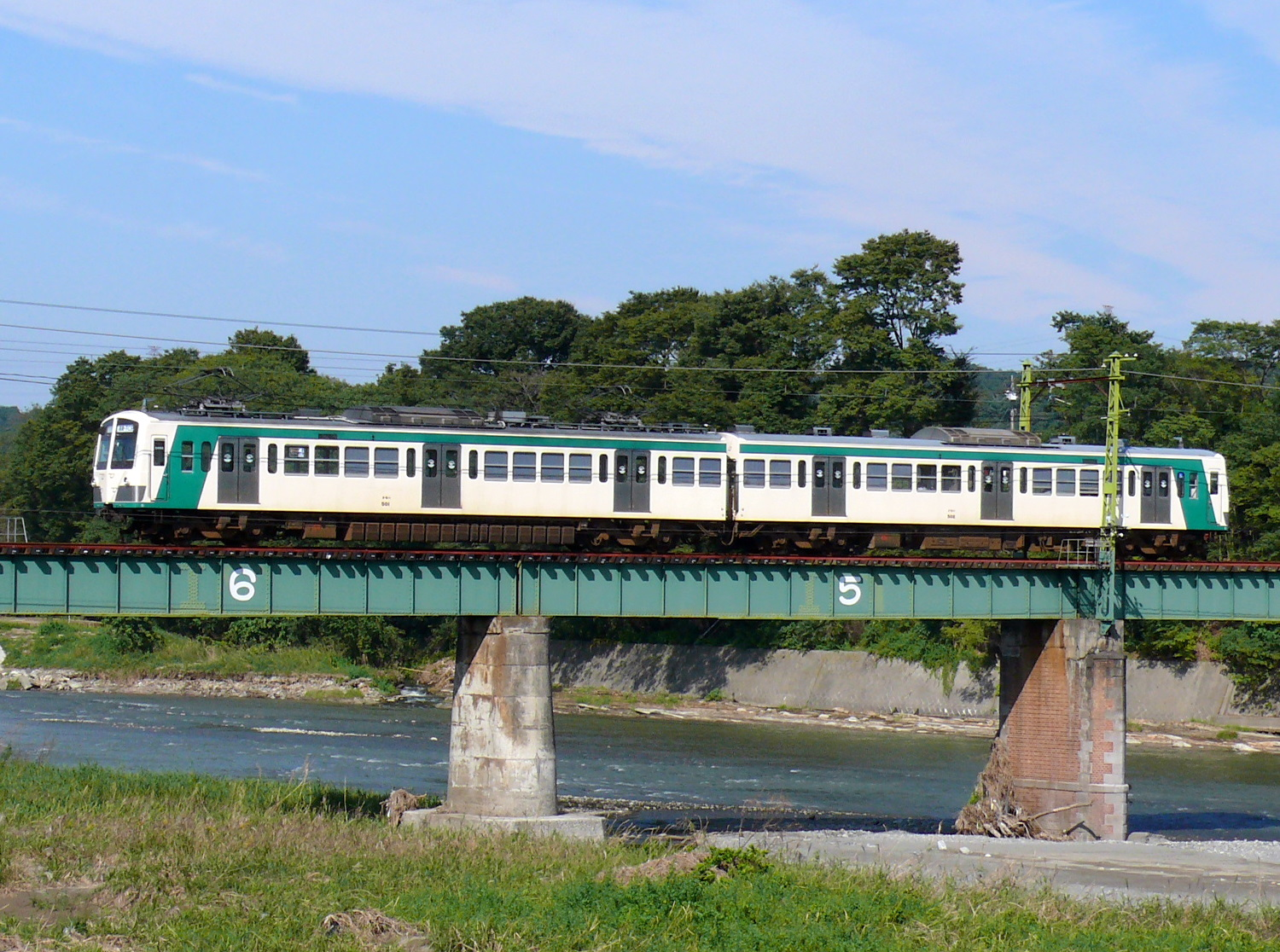 上信電鉄線を走るクモハ503-クモハ504 （2007年 馬庭 - 吉井）